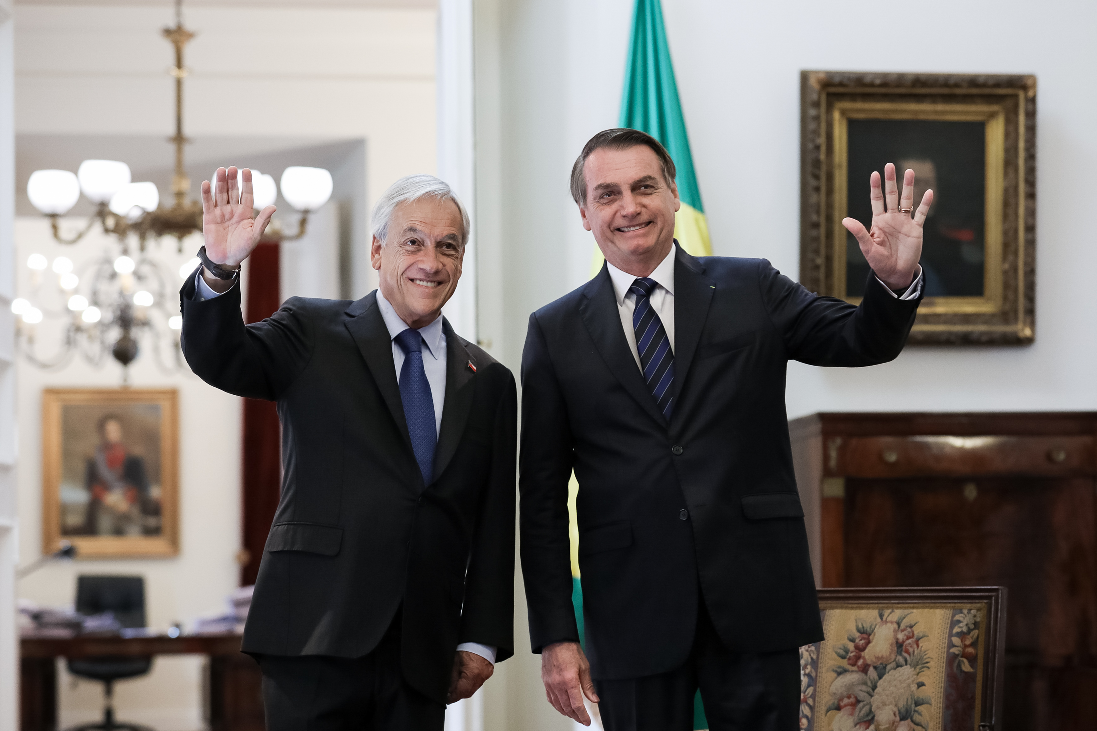 (Santiago - Chile, 23/03/2019) Presidente da República, Jair Bolsonaro durante Reunião Bilateral com Presidente do Chile, Sebastián Piñera.Foto: Marcos Corrêa/PR